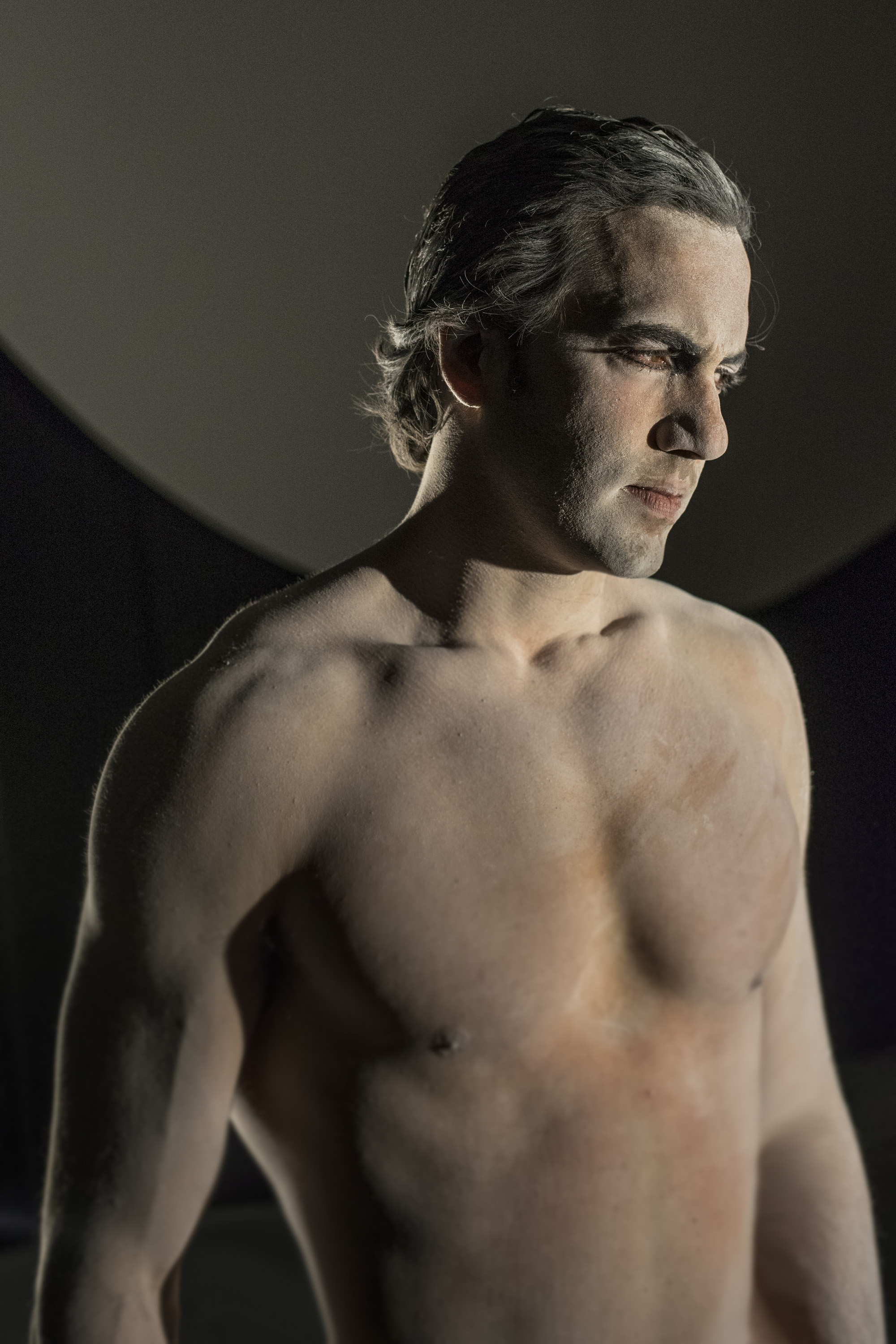 Joao Paulo Lorenzon em Nijinsky